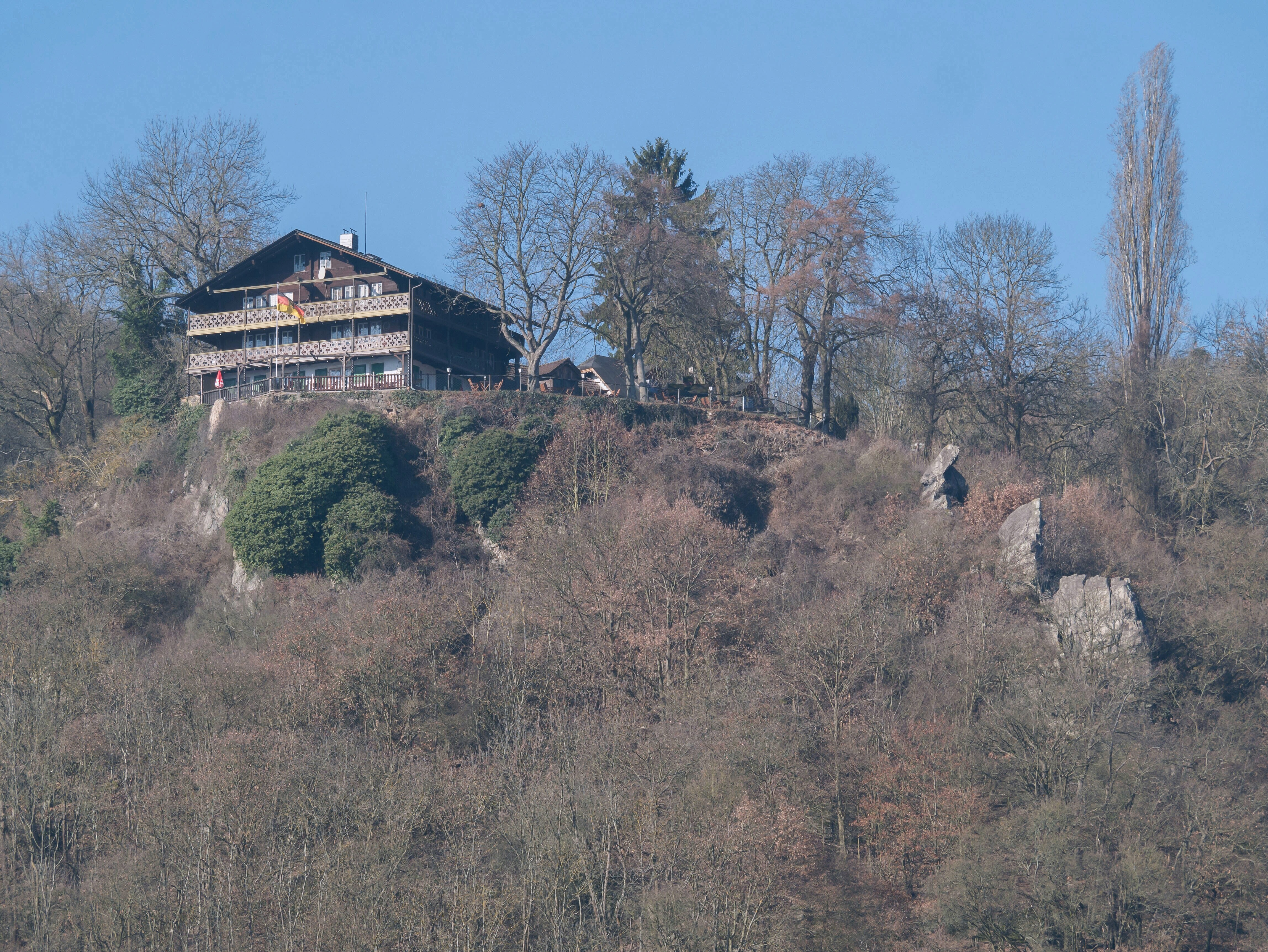 Hoch über dem Rhein im Bingerwald steht die Gaststätte "Schweizerhaus".